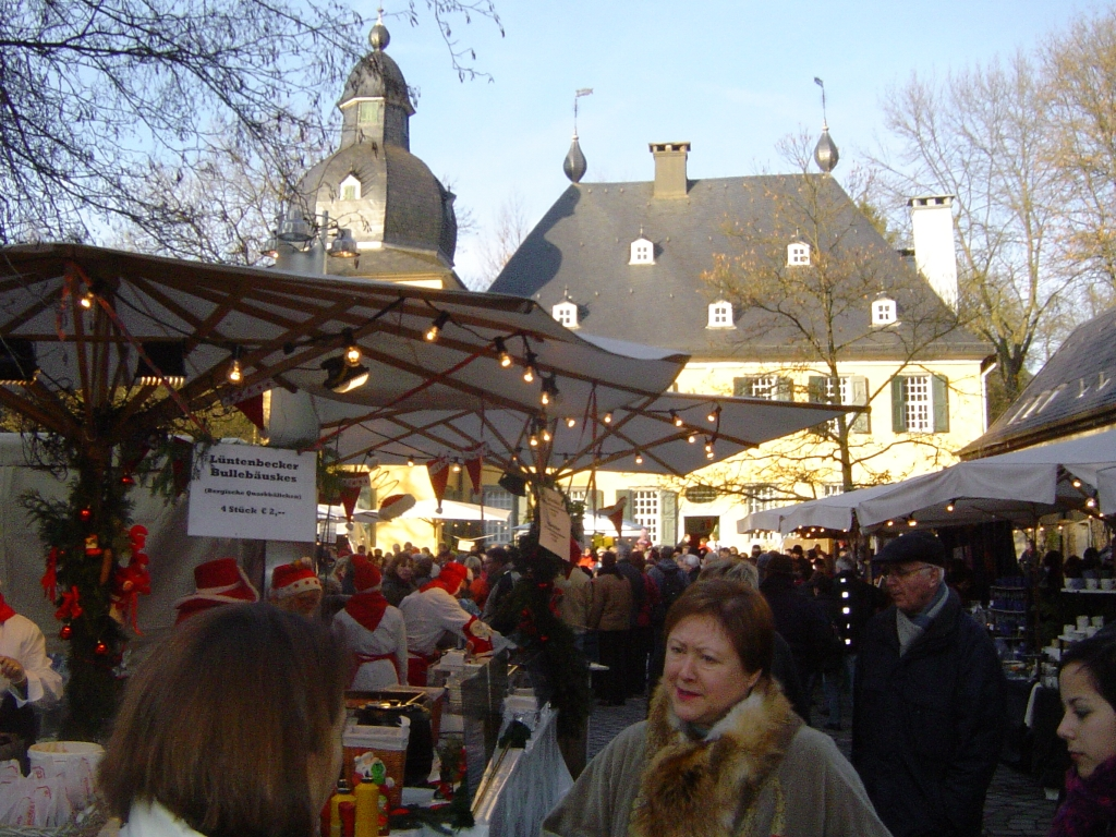 Weihnachtsmarkt in Wuppertal-Lüntenbeck fotografiert von Pitichinaccio, 10.12.2005